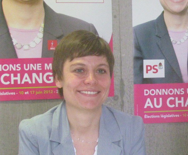 Audrey Linkenheld lors de la campagne des élections législatives à Villeneuve d'Ascq - Deuxième Circonscription du Nord